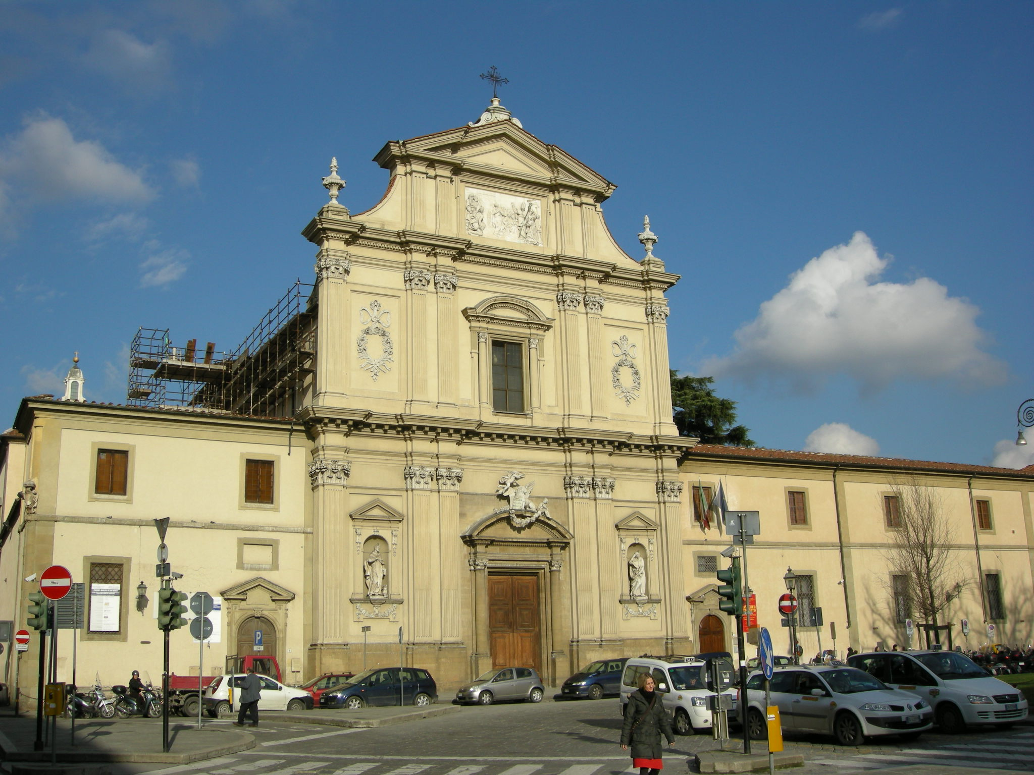 Chiesa di san marco, facciata